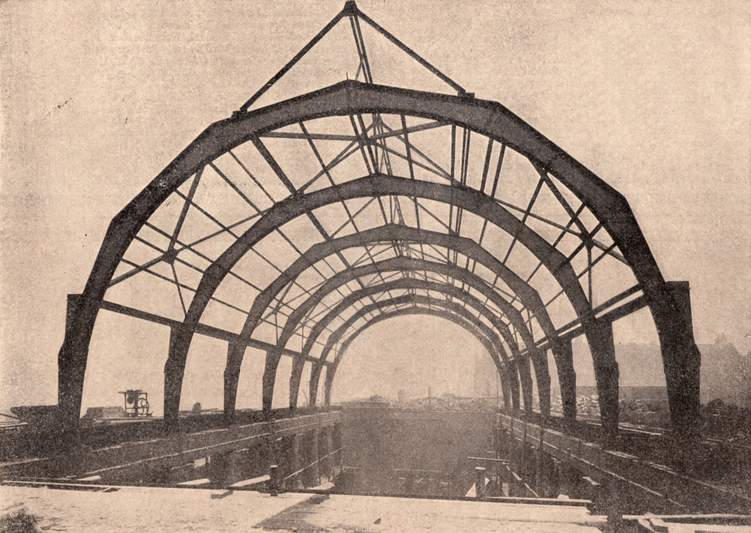 Berlin - Bau der Dachkonstruktion des Stadtbades Neukölln, Werbeannonce in der Zeitschrift Bauwelt 1914